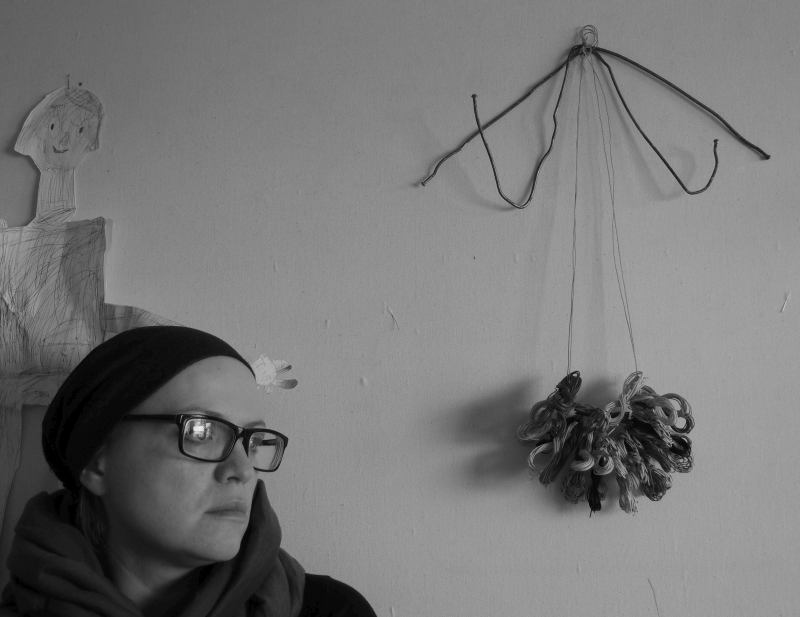 Agnė Jonkutė